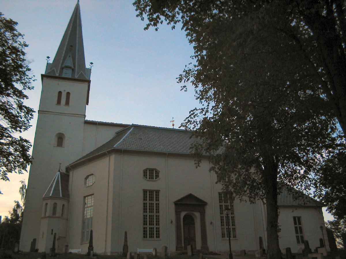 Vang kirke, side.